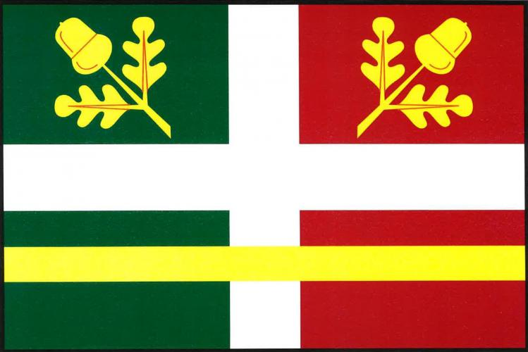 Doubravička vlajka